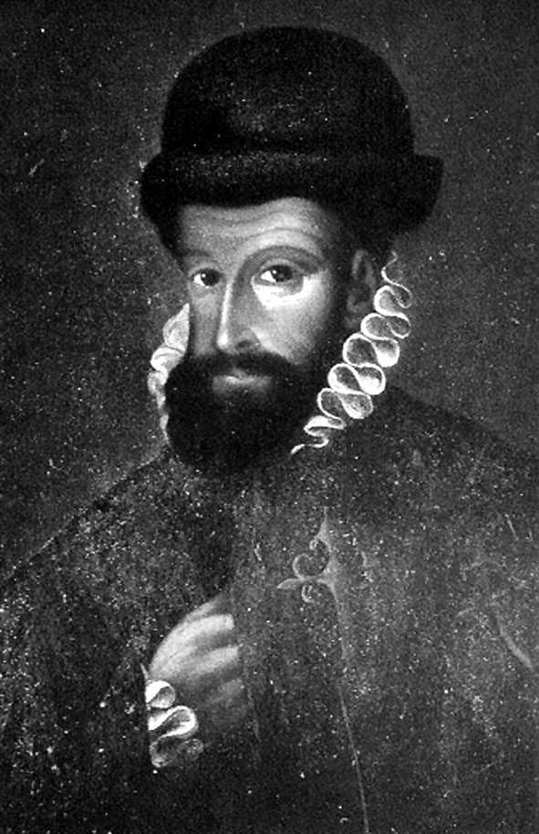 sujet: Hernan Cortes licence